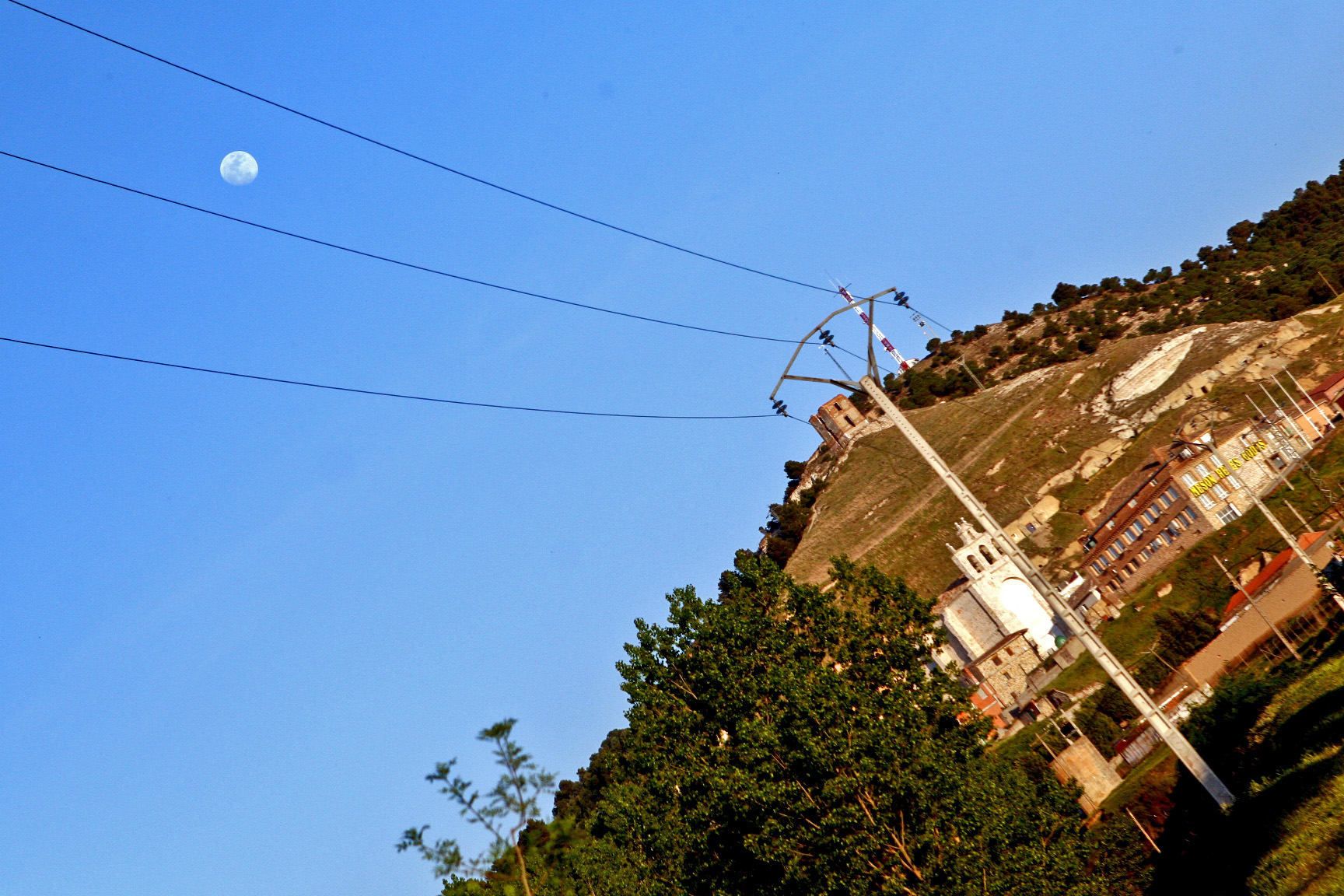 Canon 30, Canon 24-70L f2.8 Tariego de Cerrato, Palencia